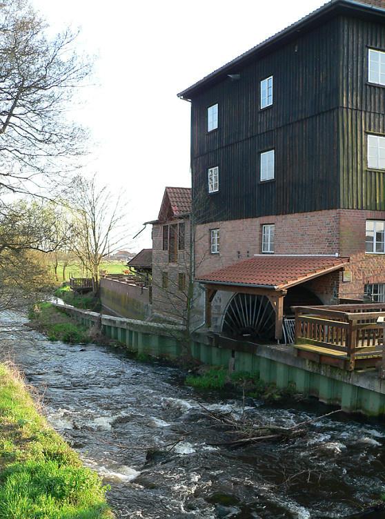 Ise bei Wahrenholz